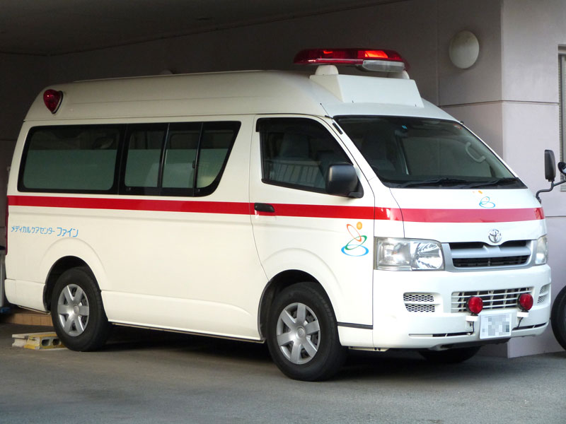 レジアスエースの救急車